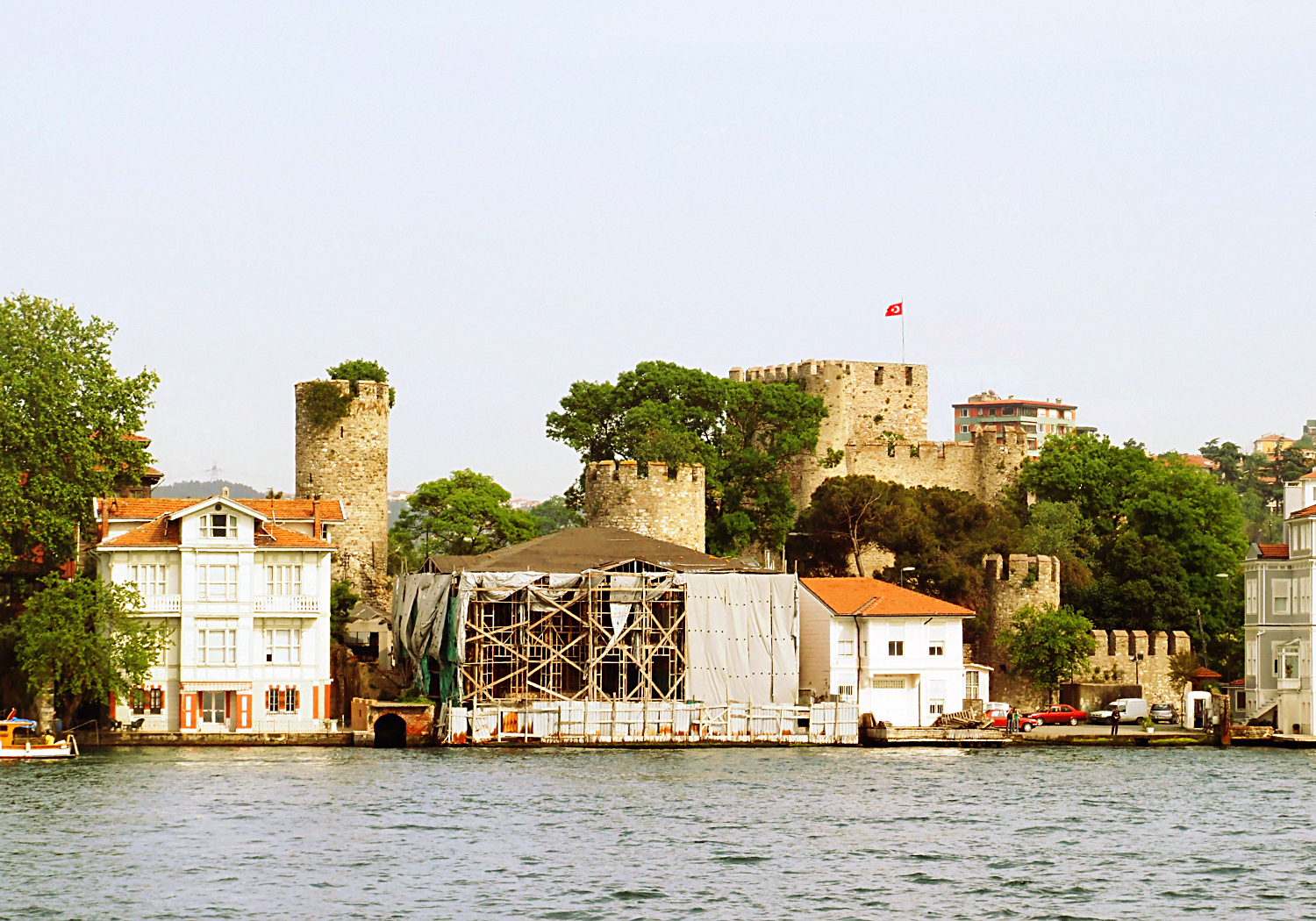 Stambuł, Anadolu Hisari; Istambul, Anadolu Hisari